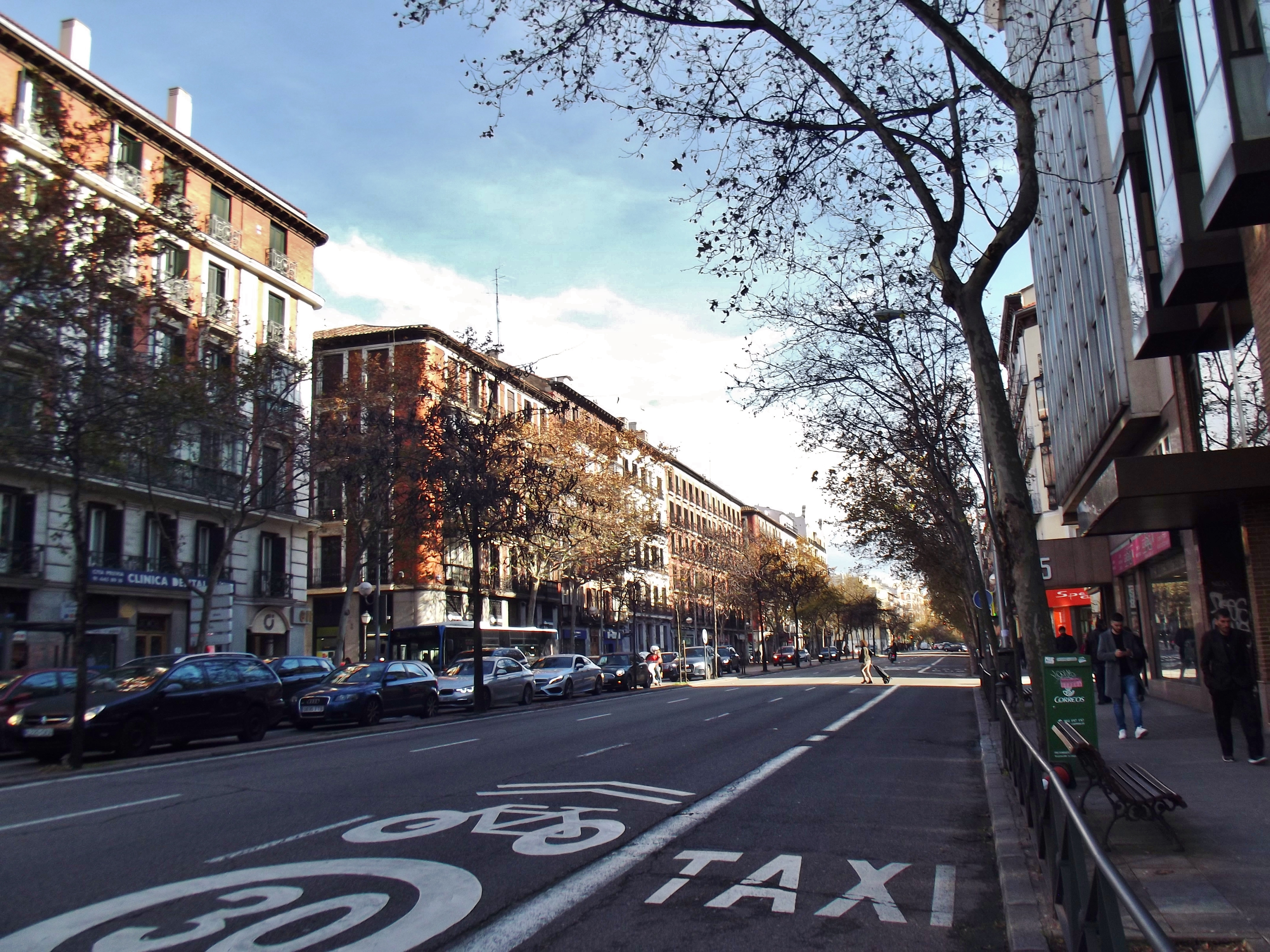 Calle de Carranza, Madrid